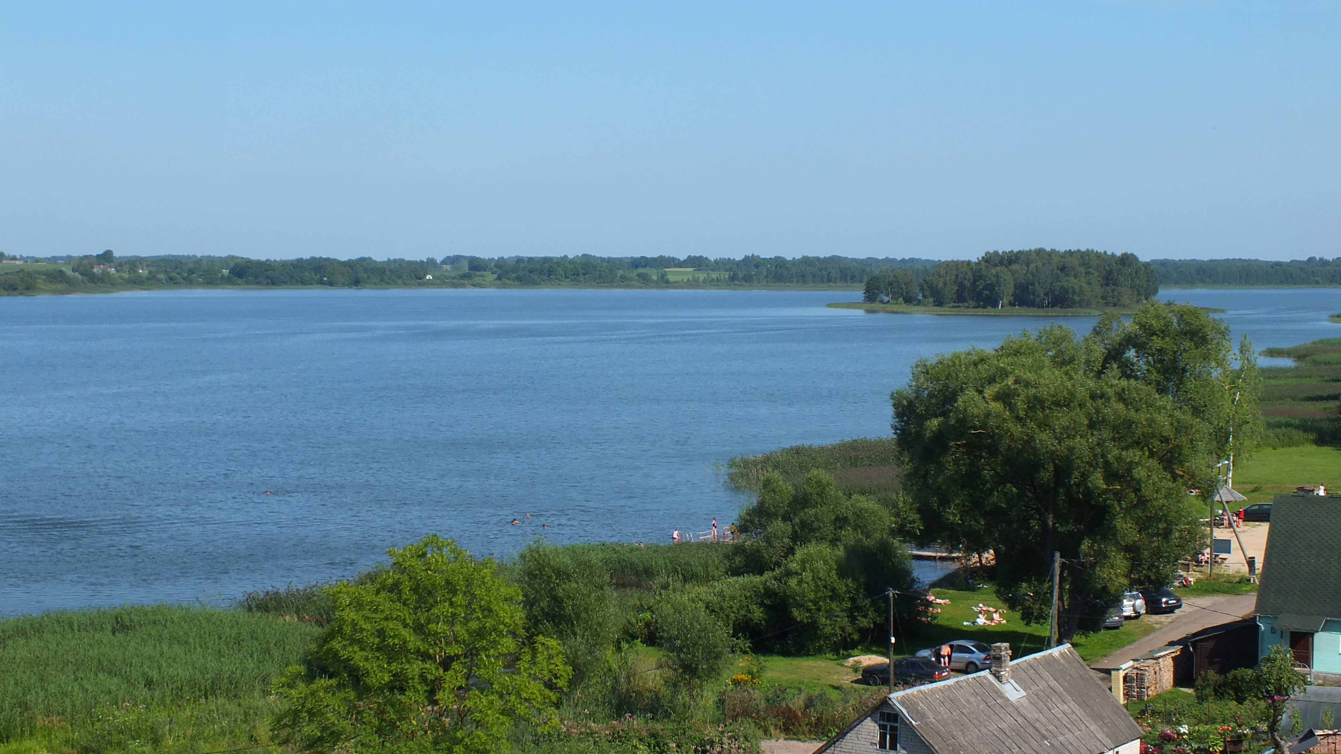 Lielais Ludzas ezers no pilsdrupām